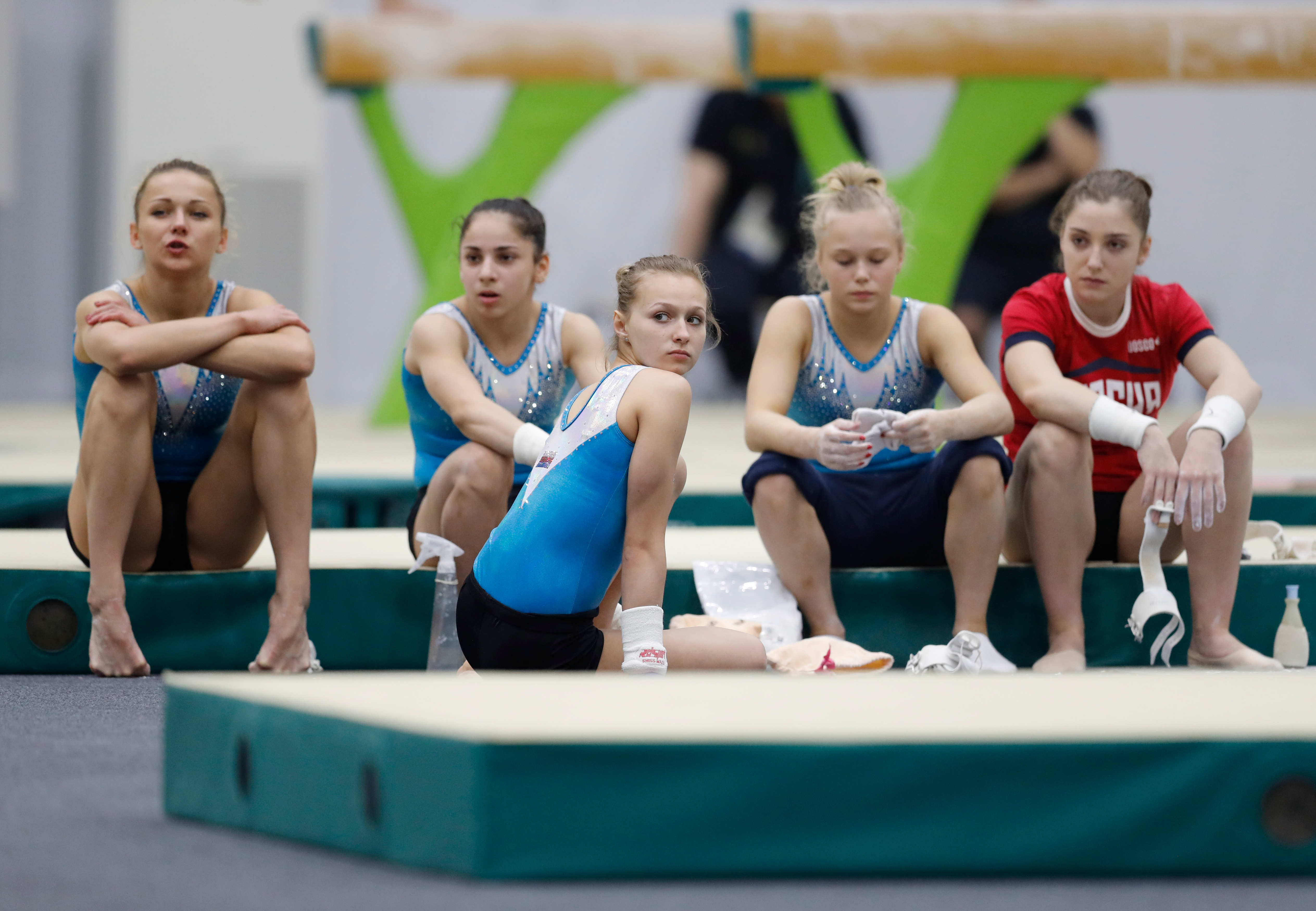 Rio de Janeiro - Equipe de ginástica artística da Rússia treina no Parque dos Atletas para os Jogos Olímpicos Rio 2016 (Fernando Frazão/Agência Brasil)